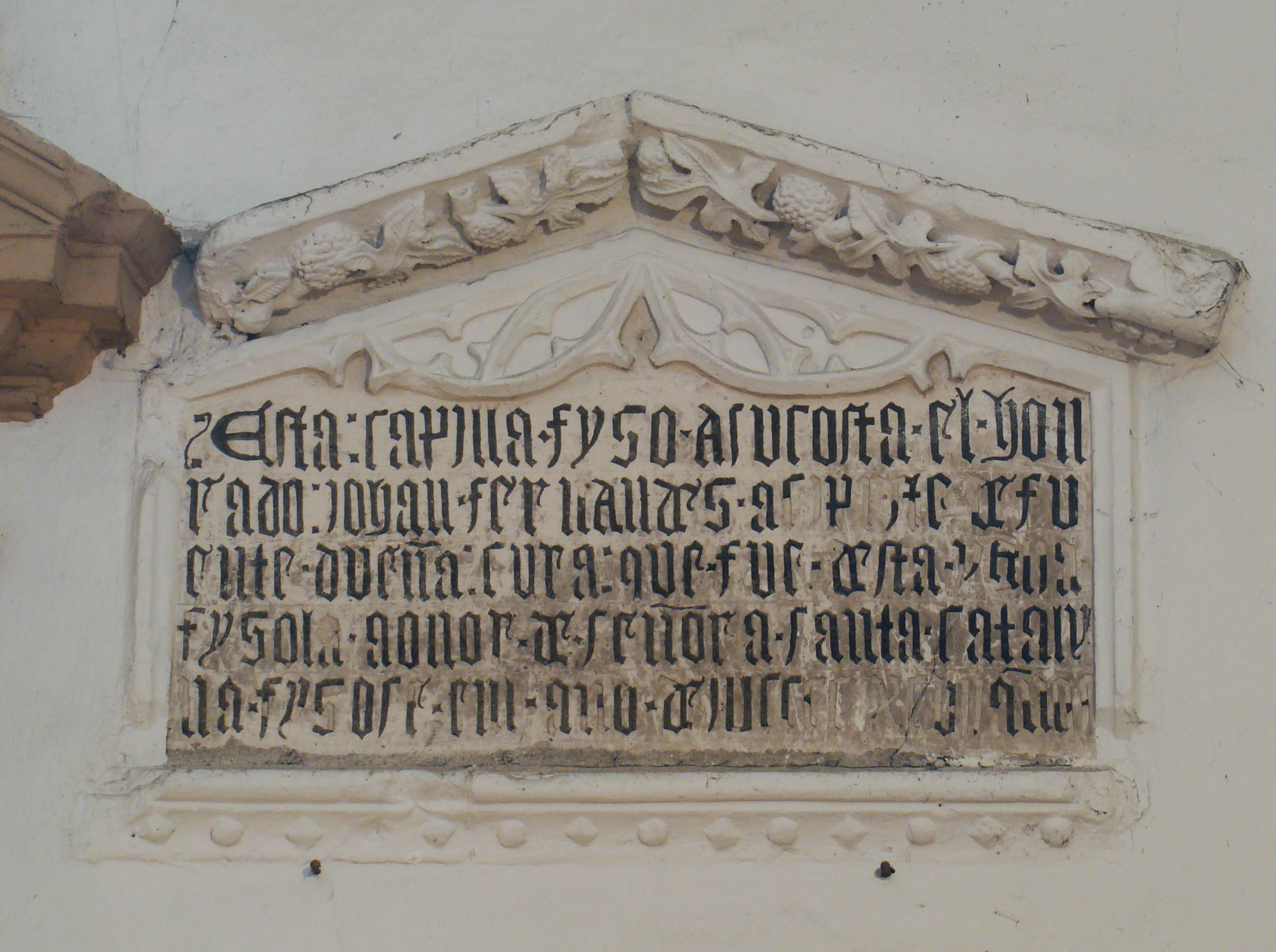 Aldeamayor de San Martín (Valladolid, España). Inscripción sobre fundación en la capilla de Santa Catalina de la iglesia de San Martín de Tours.